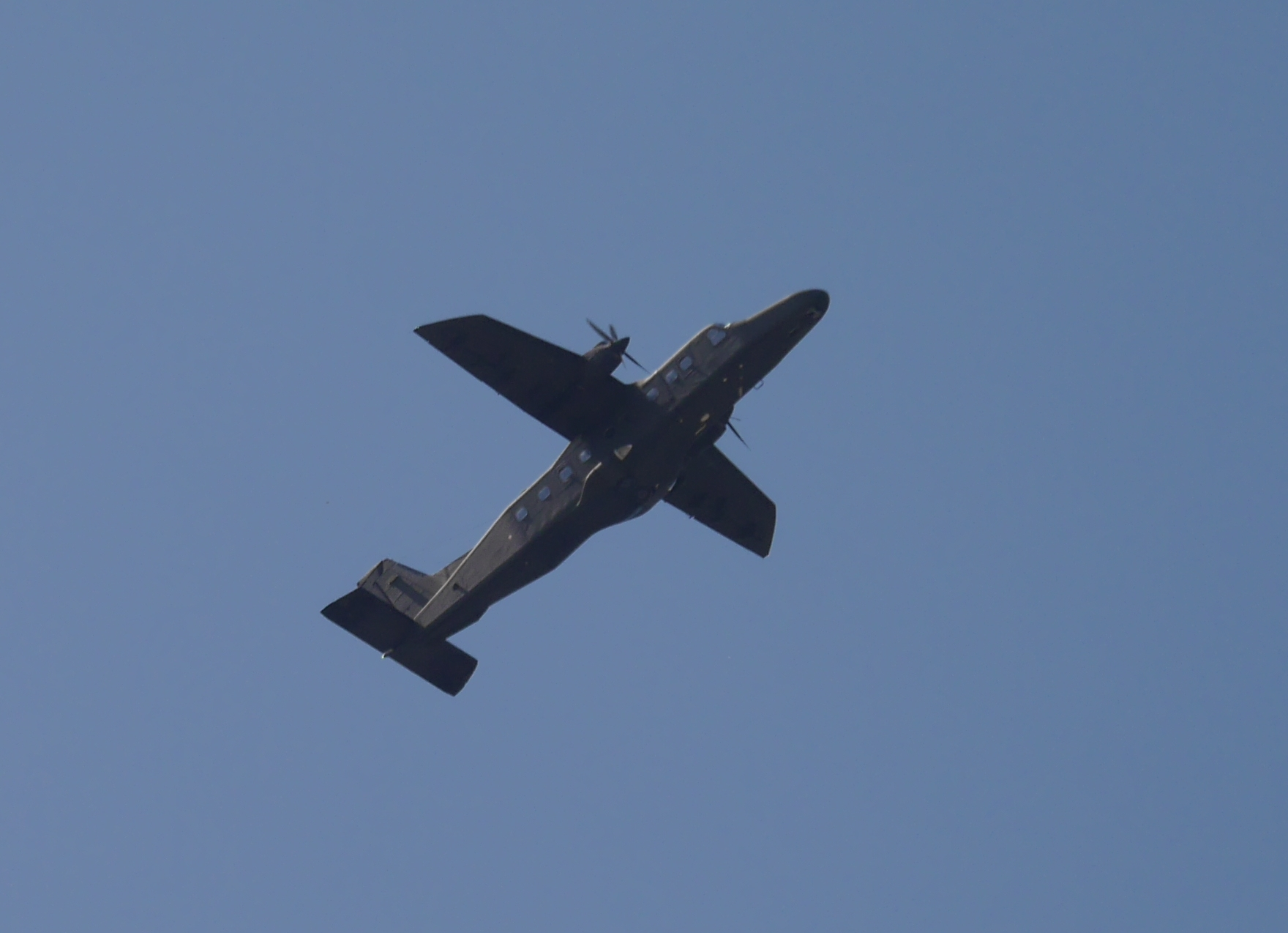 This photo was taken with Panasonic Lumix DMC-G6 camera, thanks to Panasonic.You can see all photographs in category: Taken with Panasonic Lumix DMC-G6.